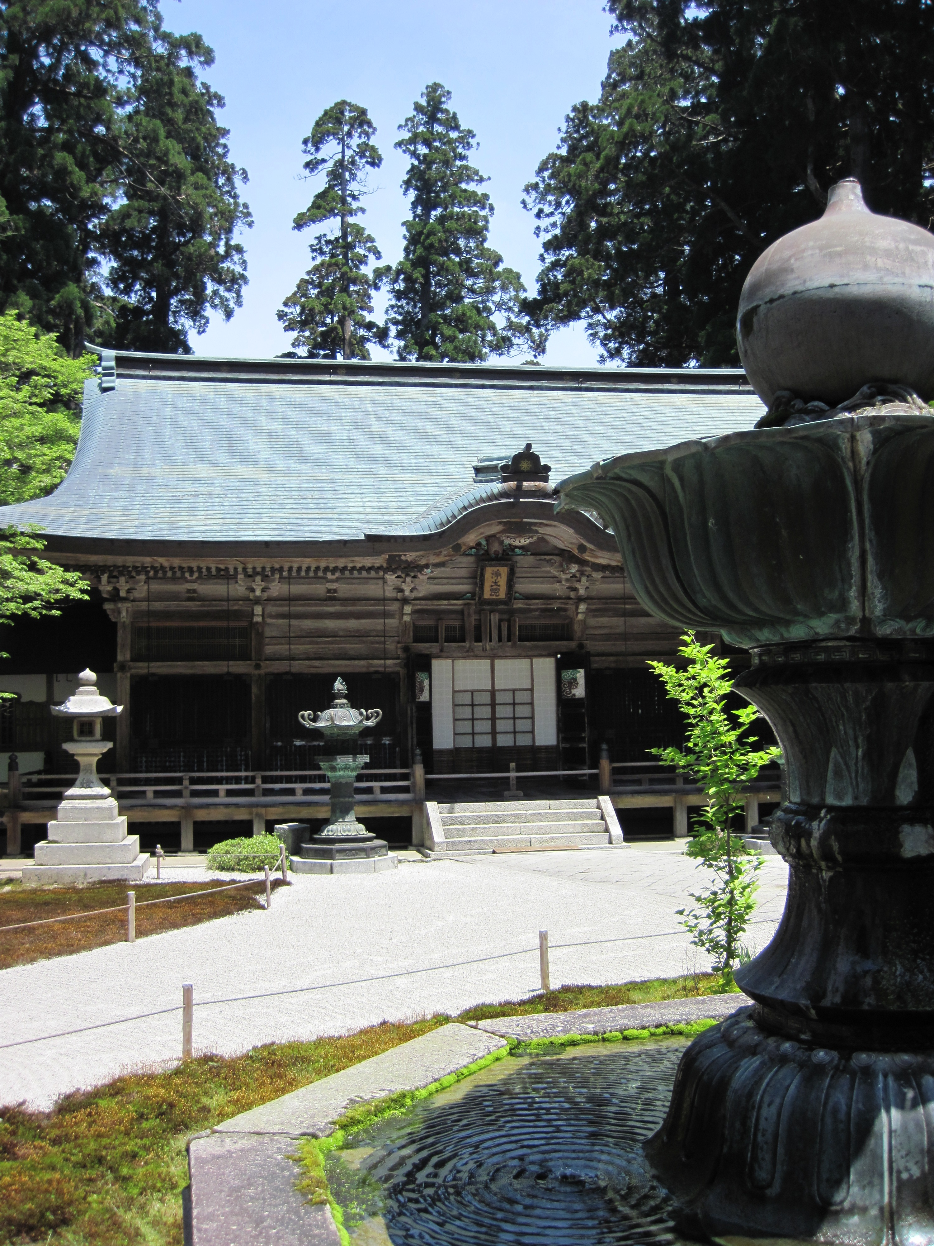 浄土院、伝教大師御廟、滋賀県大津市比叡山延暦寺